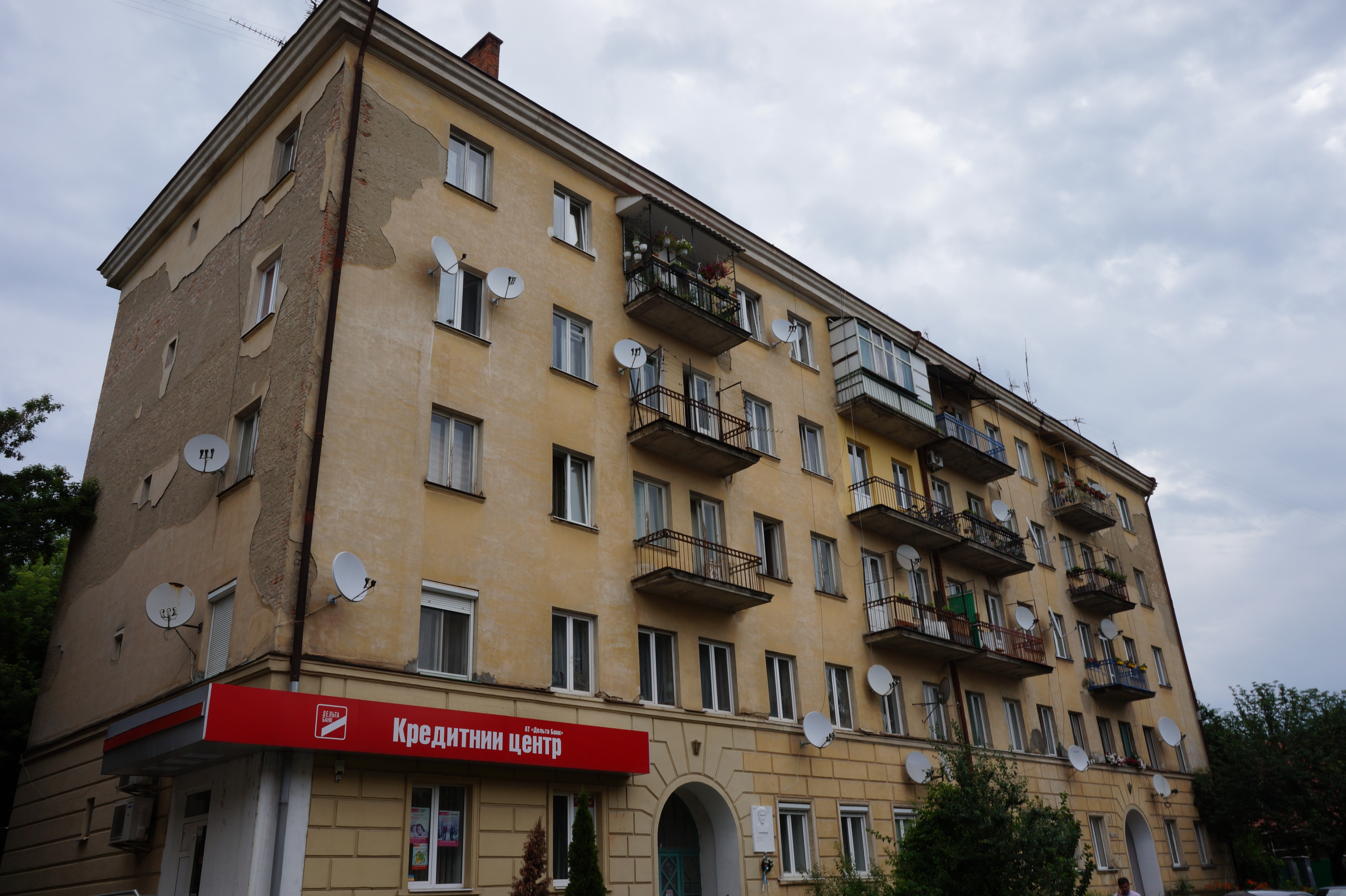 Будинок, в якому жив і працював знаний журналіст, культурний та громадський діяч М.І. Бабидорич, Ужгород, вул. Ракоці, 16/2